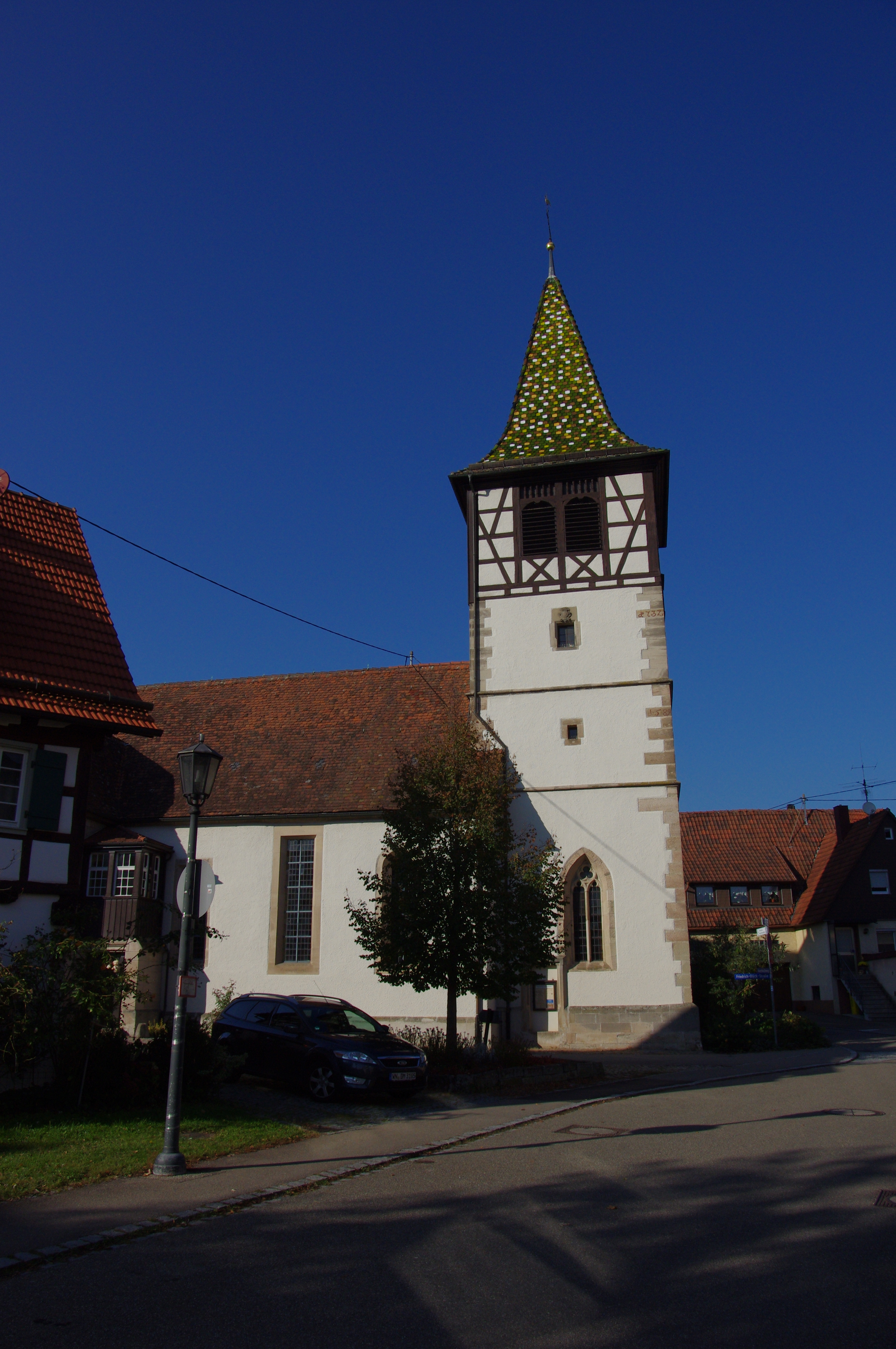 Evangelische Kirche, Schorndorf-Schornbach